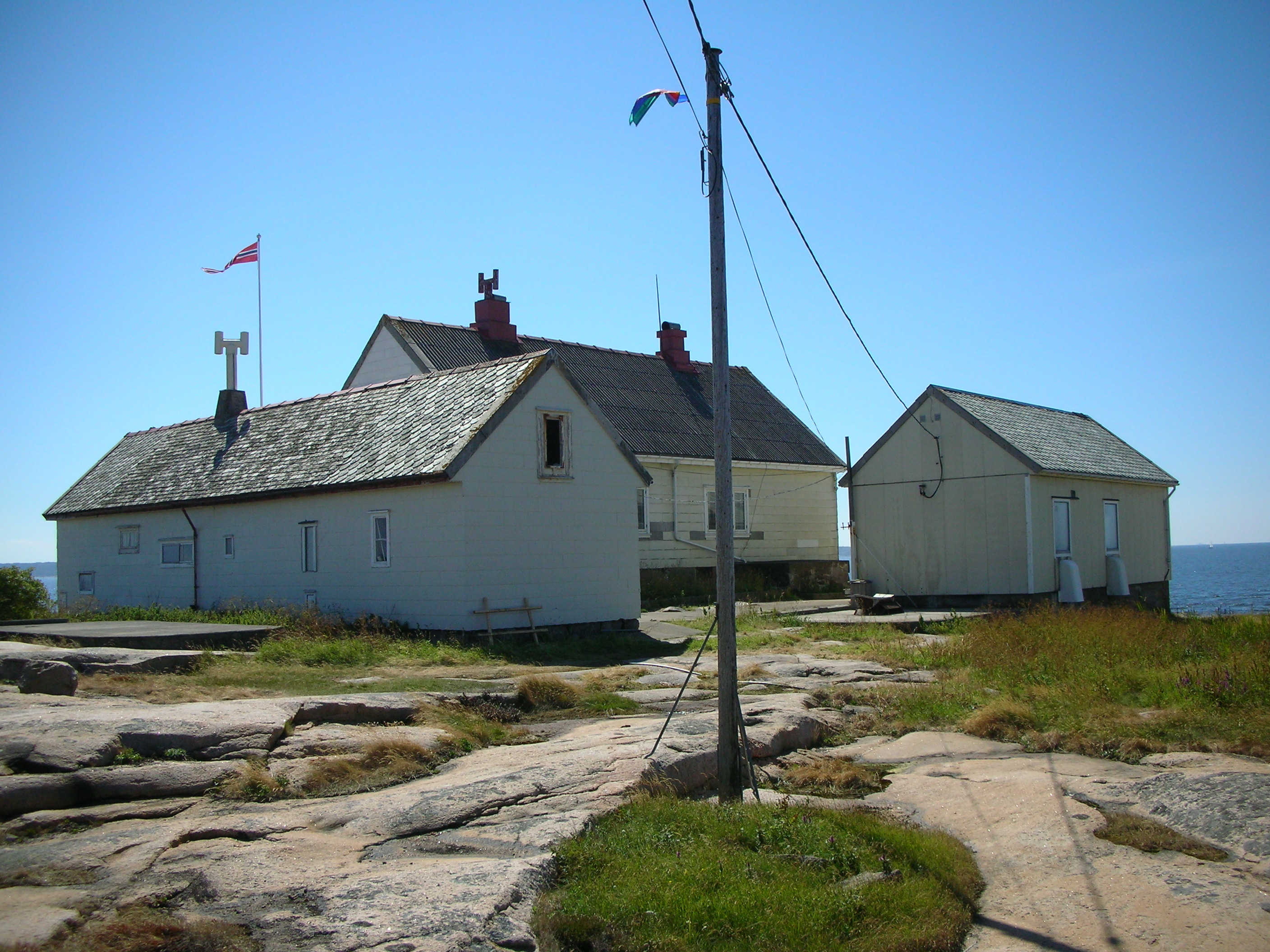 Strømtangen fyr ligger på en øy i Onsøy, like utenfor Fredrikstad.